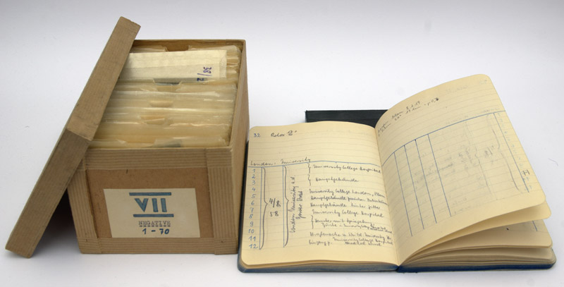 Mittelformatnegative von Richard Kitschigin mit akribischen Aufzeichnungen für jede einzelne Aufnahme. Foto: Thomas Gade